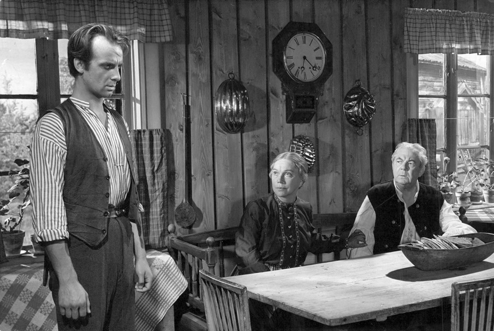 "Sången om den eldröda blomman"